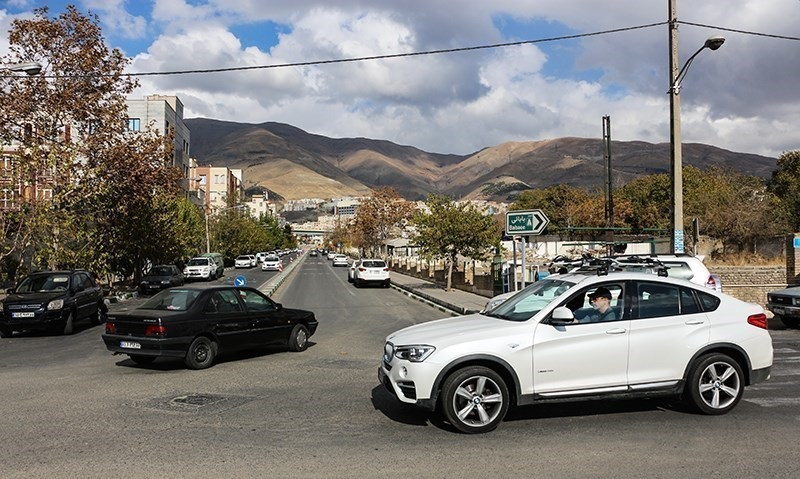 اُزگل